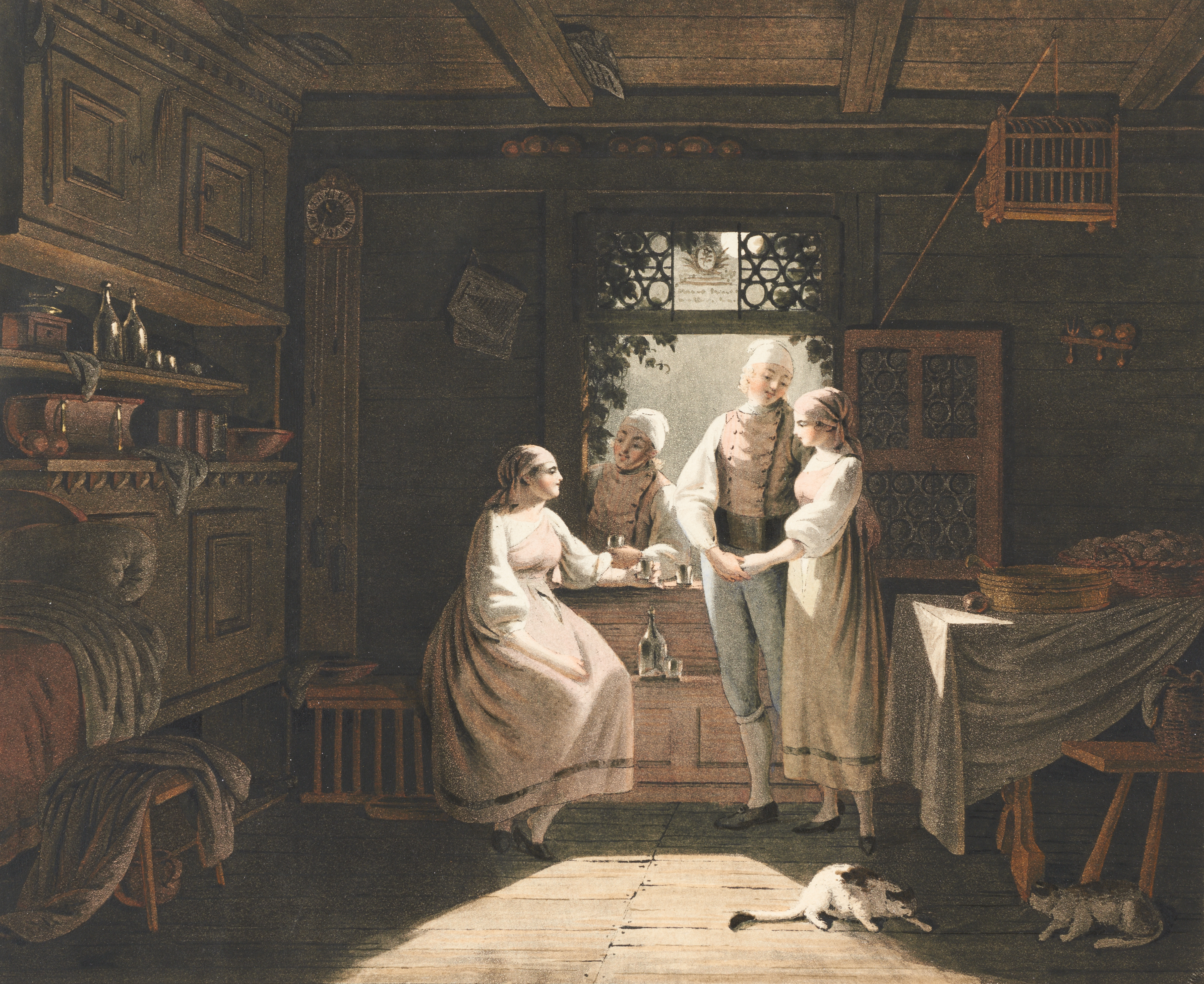 Bräuche, Kiltgang; Aquatinta, koloriert